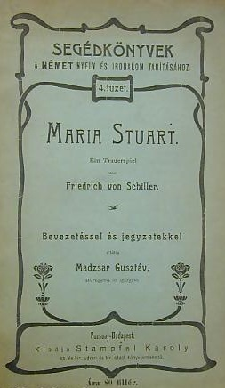 Friedrich Schiller: Maria Stuart, bevezetéssel ellátta Madzsar Gusztáv (1864-1934), Segédkönyvek a német nyelv és irodalom tanításához-sorozat